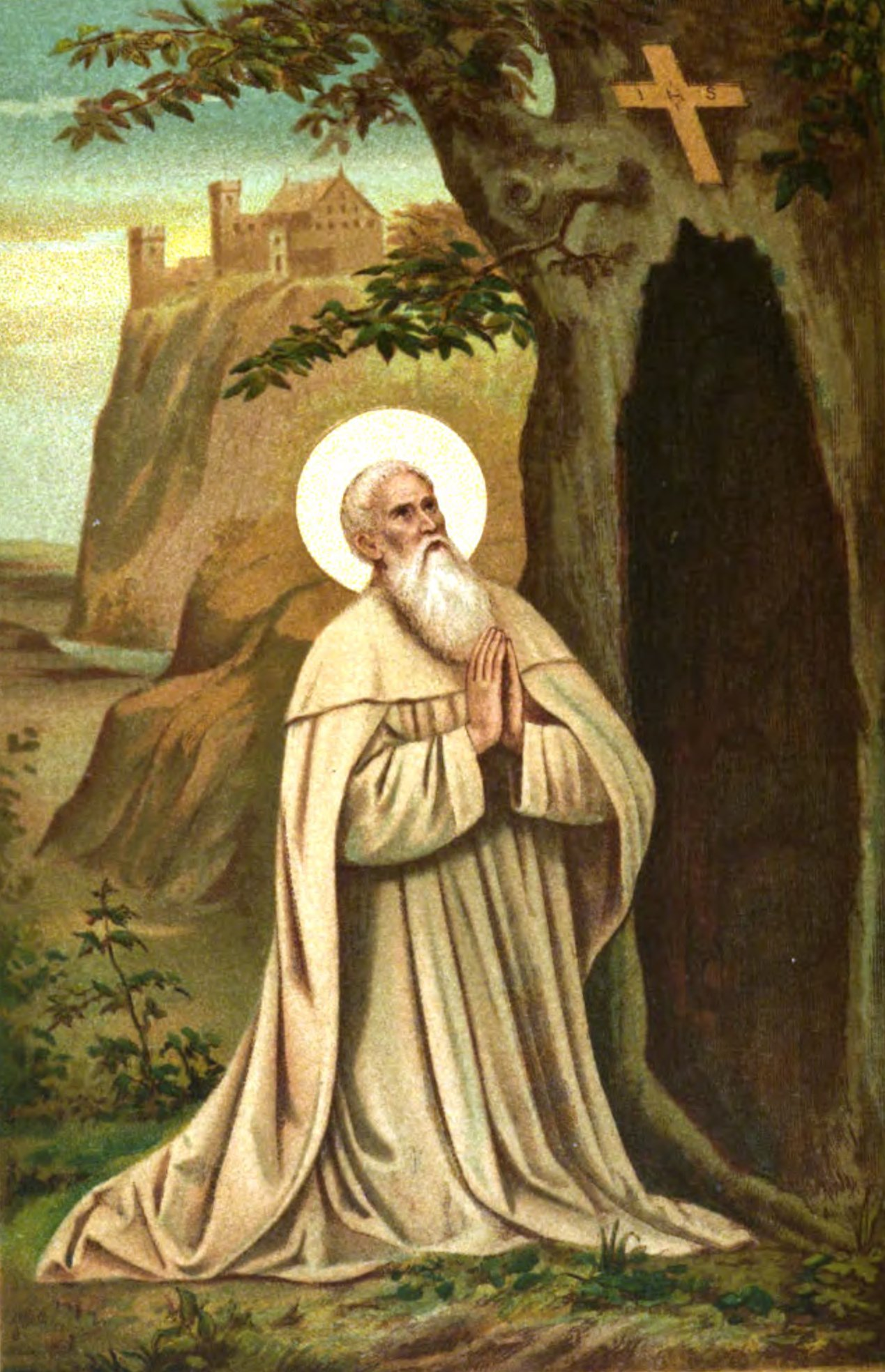 De H. Gerlacus